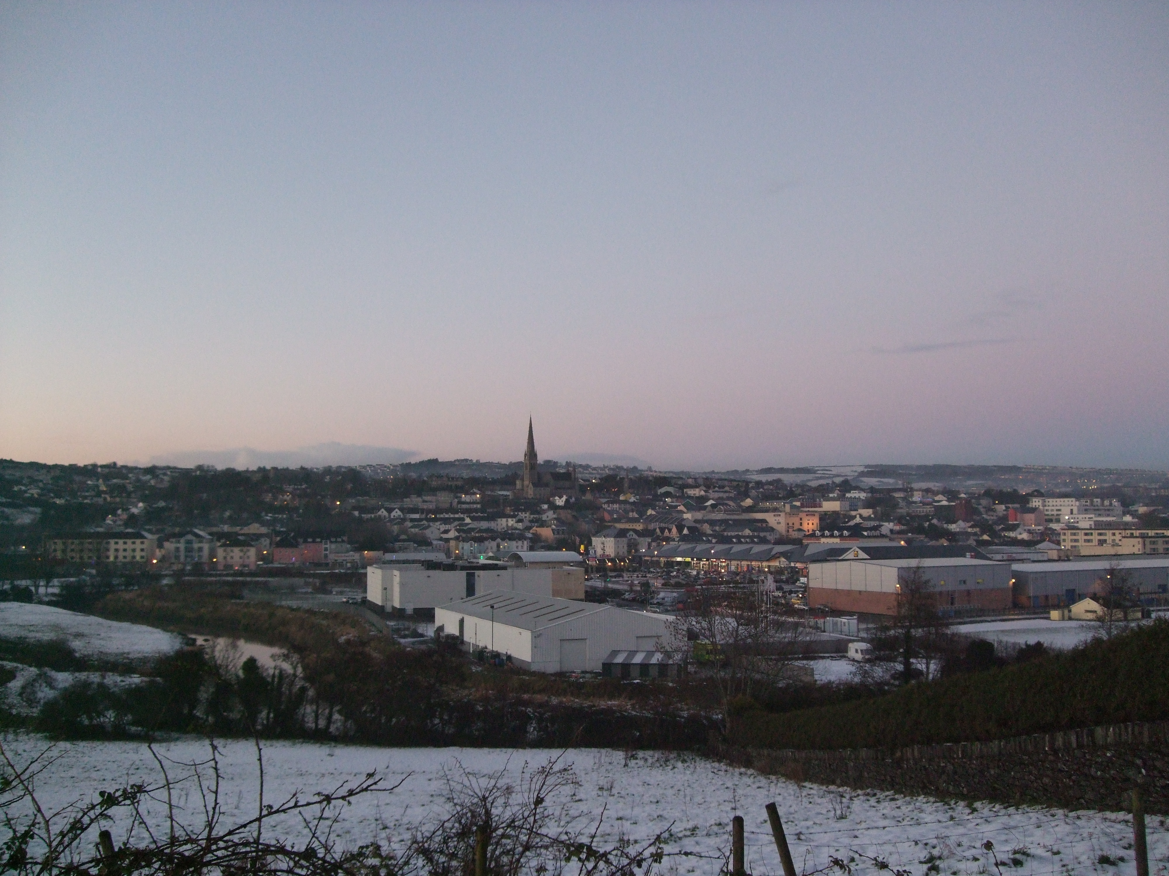 Vue générale de Letterkenny